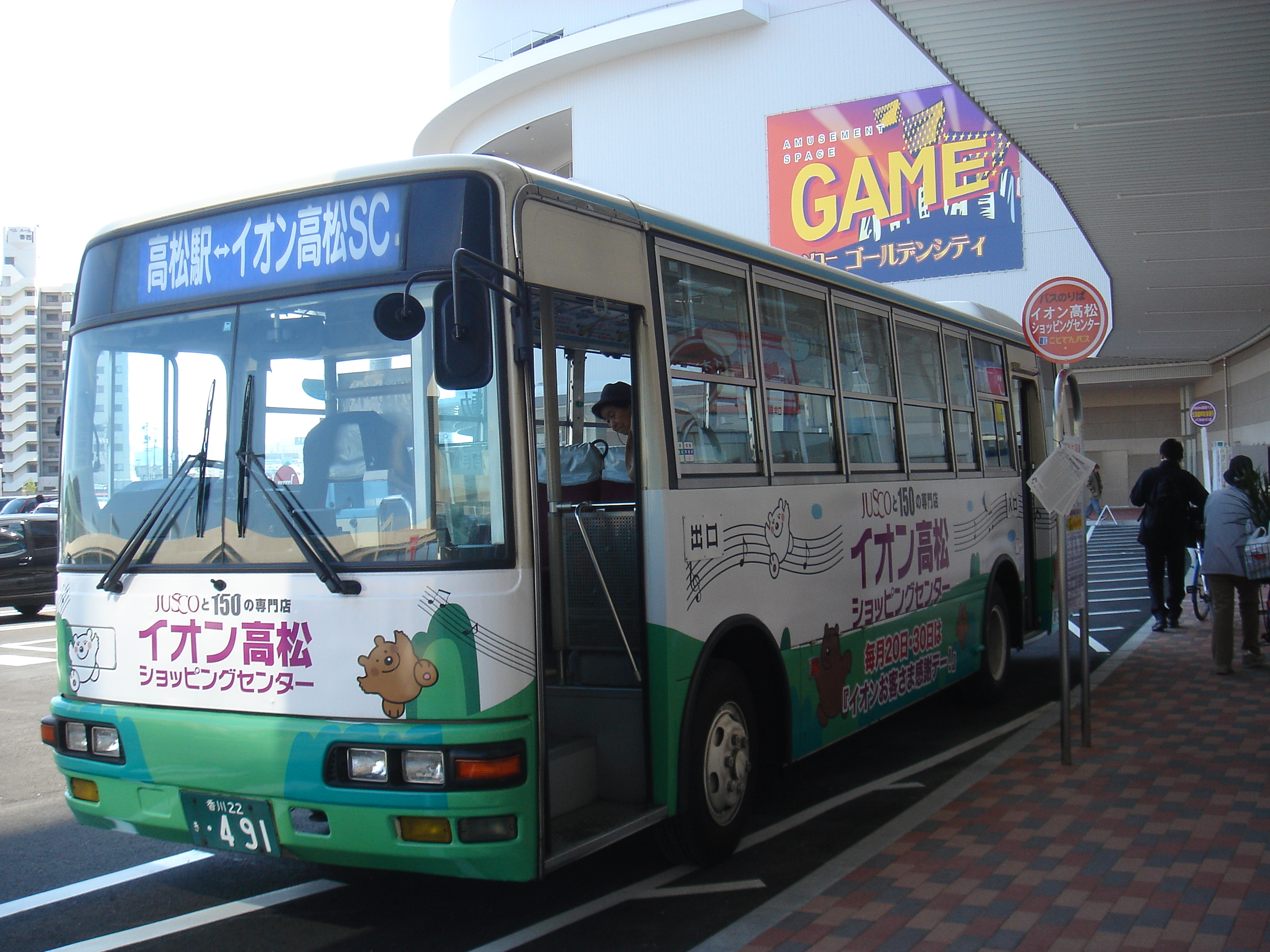 ことでんバス イオン高松ショッピングセンター塗装, a Kotoden Bus designed for AEON Takamatsu Shopping Center